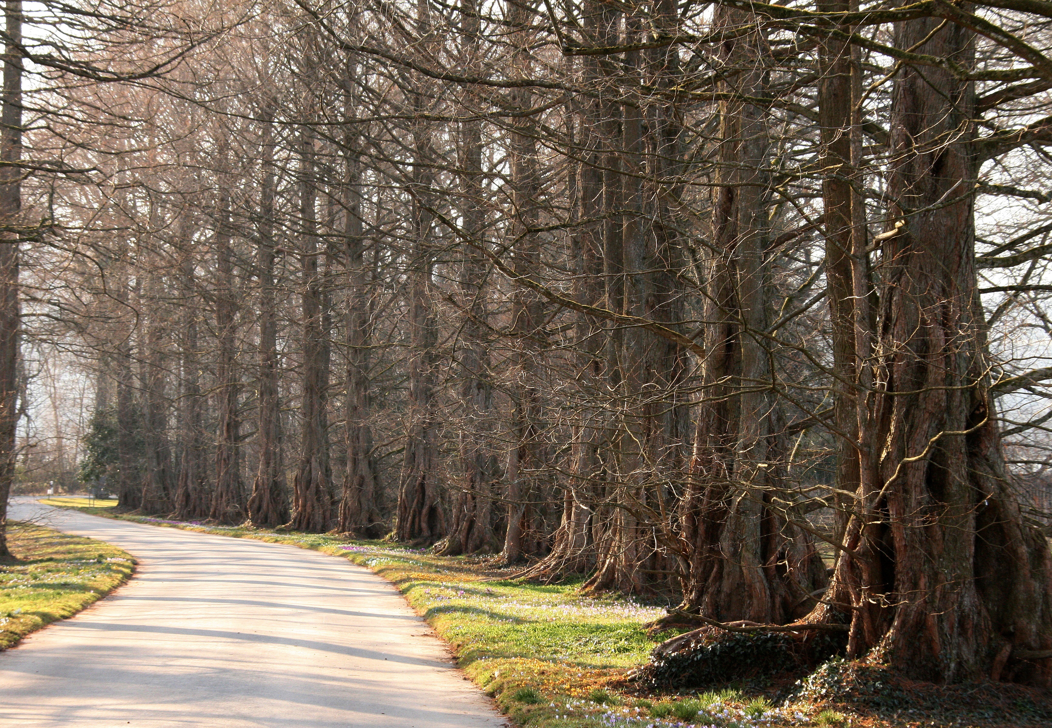 Metasequoia Allee auf der Insel Mainau am Bodensee.